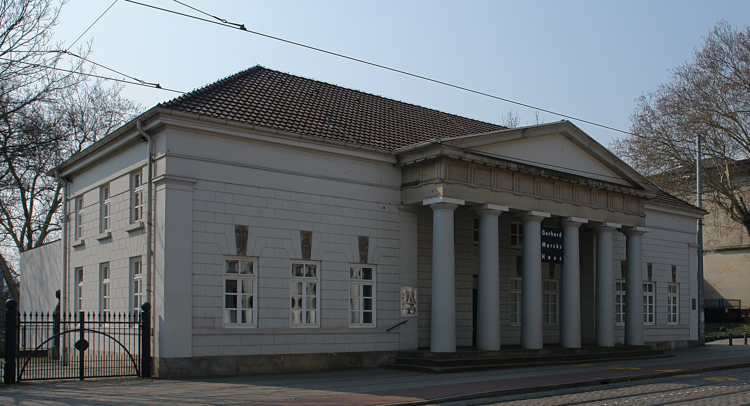 Ostertorwache (neben der Kunsthalle) in Bremen, heute Gerhard-Marcks-Haus. Architekt Friedrich Moritz Stamm (1794–1843)Das abgebildete Objekt ist ein geschütztes Kulturdenkmal in der Freien Hansestadt Bremen, mit der Nr. 1425 beim Landesamt für Denkmalpflege registriert.